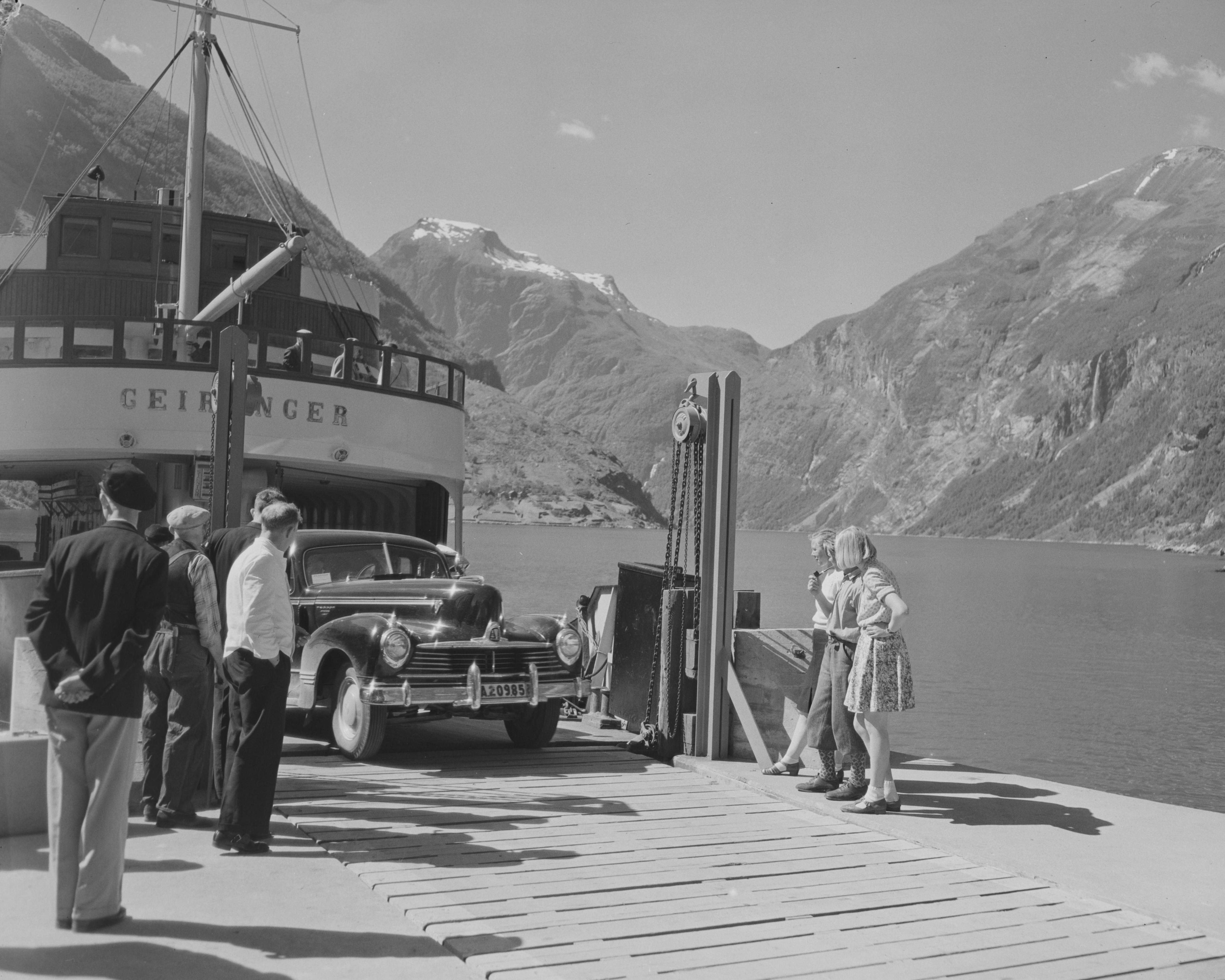 Bildet er hentet fra Nasjonalbibliotekets bildesamling. Anmerkninger til bildet var: Fotograf:Ukjent Geiranger,Geirangerfjorden, Stranda, Møre og Romsdal